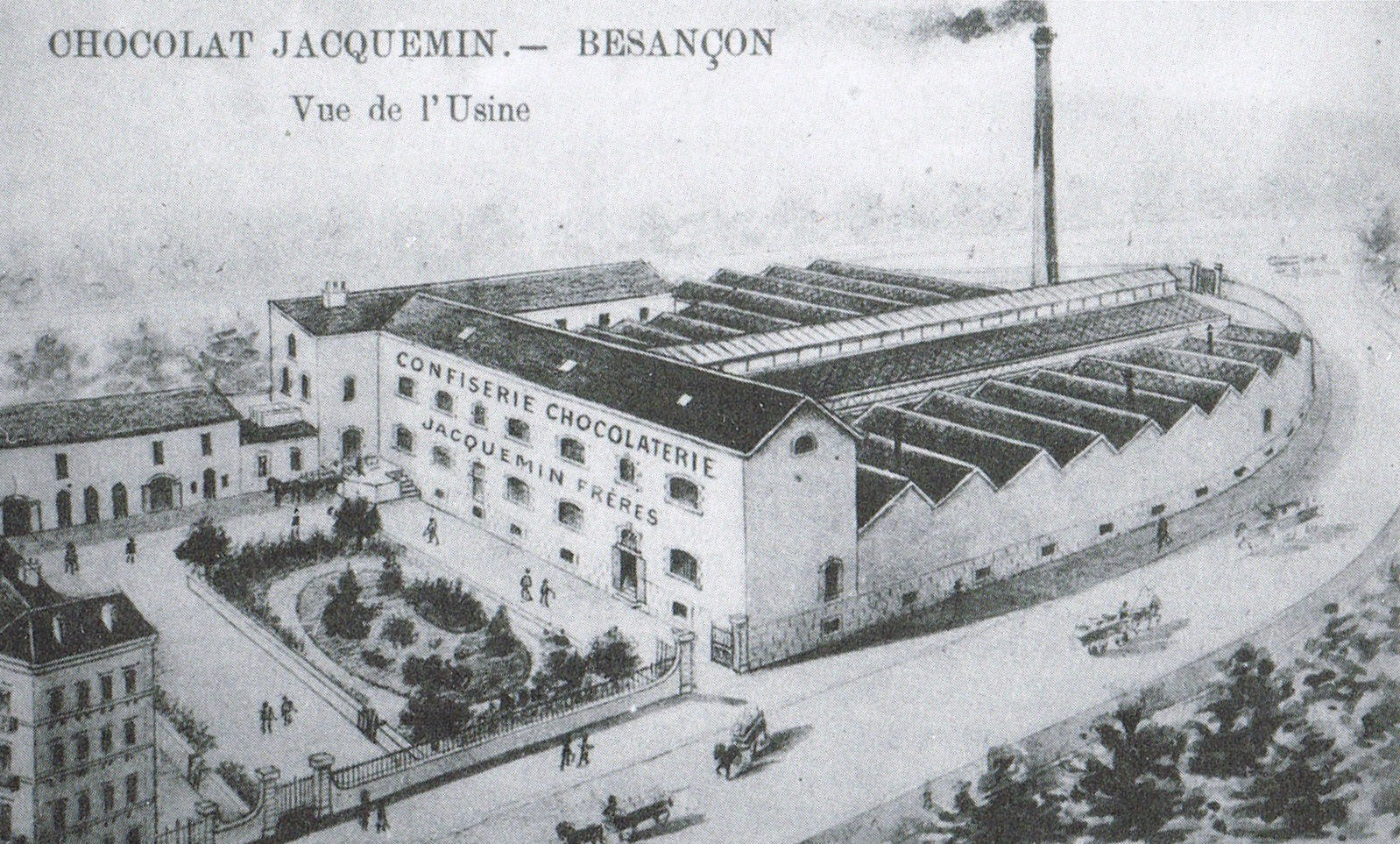 La chocolaterie Jacquemin, située rue du Château-Rose à Besançon (Doubs, France).